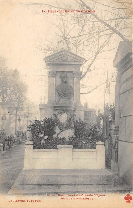 Carte postale ancienne de la collection "Le Père Lachaise historique" de Fernand Fleury.